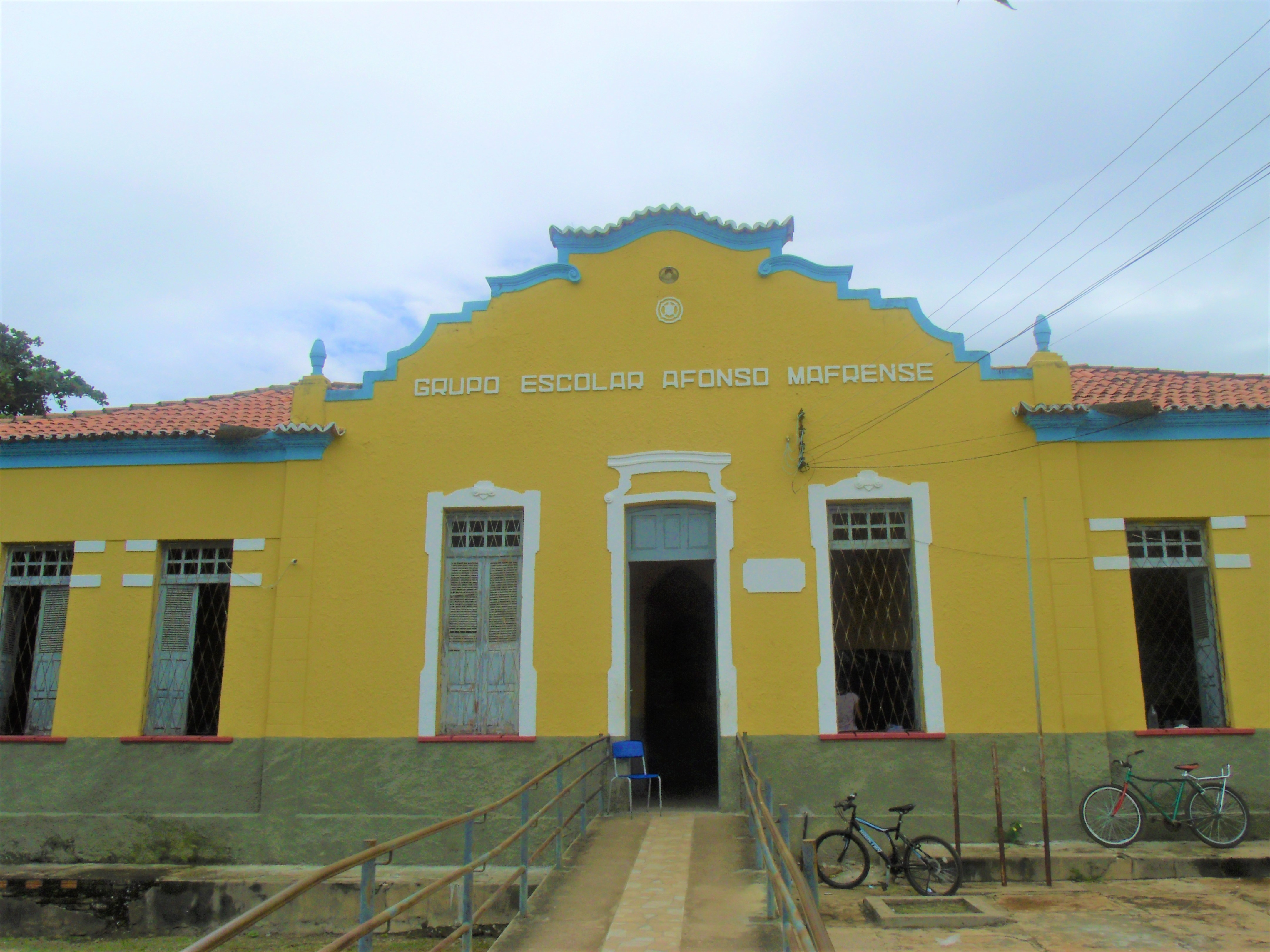 Escola Afonso Mafrense de Altos.